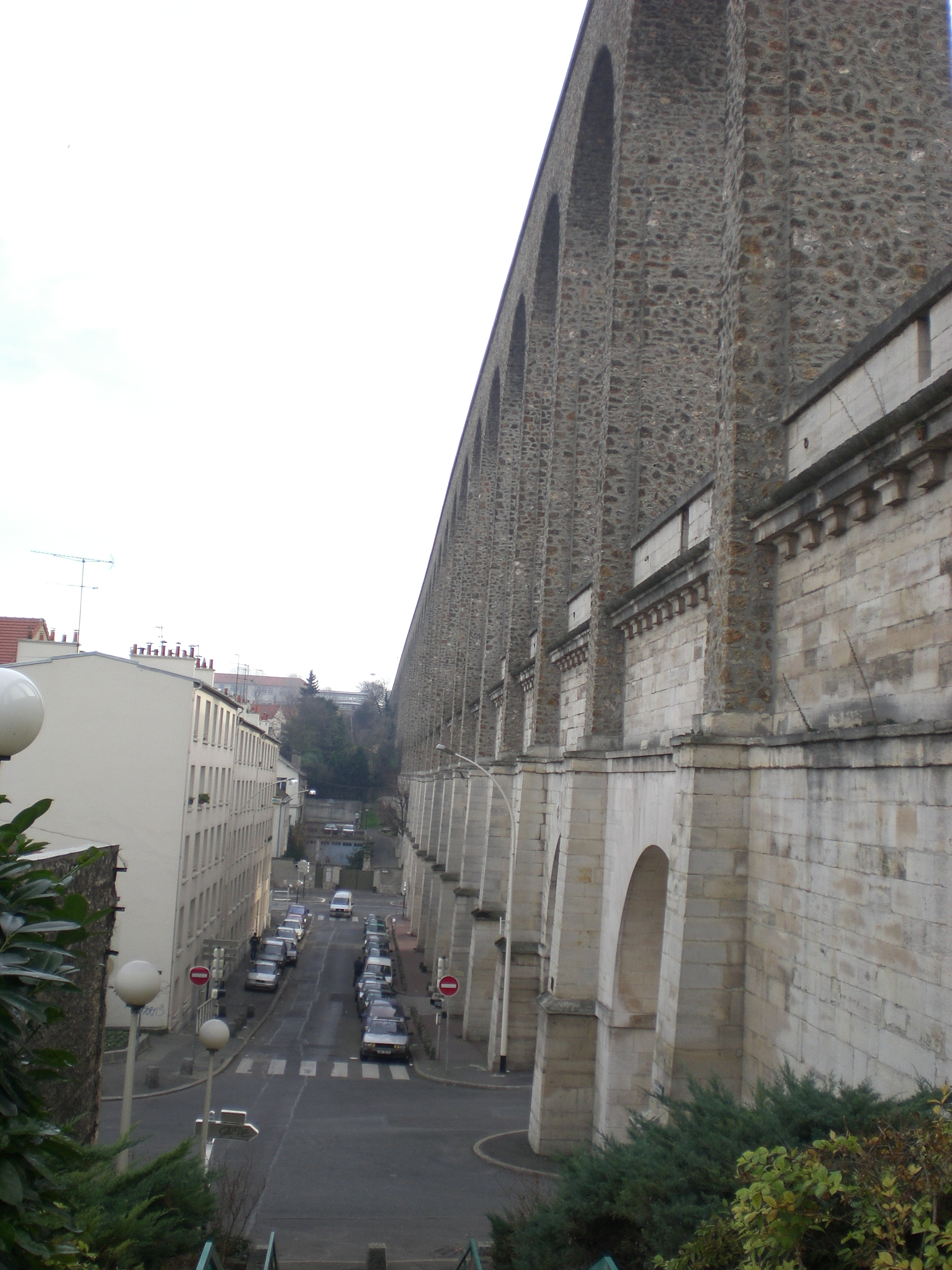 Arcueil, France Vue des aqueducs Bellegrand et Médicis, côté Arcueil, vue d'Est en Ouest.